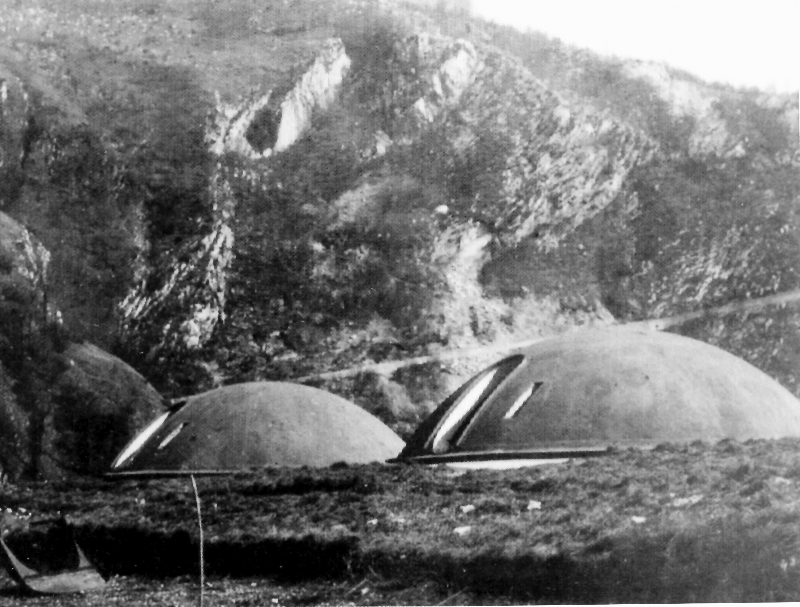 Cupole (disarmate) tipo Armstrong per cannone 149 - forte di Monte Ercole - Ospedaletto di Gemona . Friuli Venezia Giulia Sullo sfondo la strada militare per sella Sant'Agnese